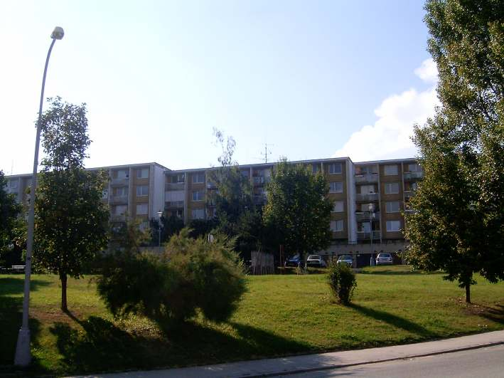 Brno Komín, pohled na ulici Běly Pažoutové